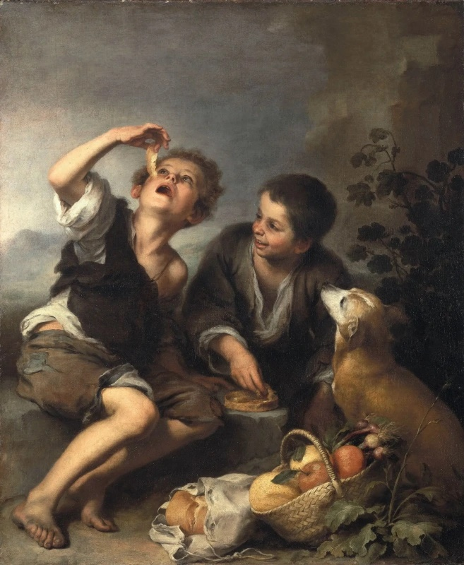 Niños comiendo en una tartera, óleo sobre lienzo, 123,5 x 102 cm., Munich Alte Pinakothek.